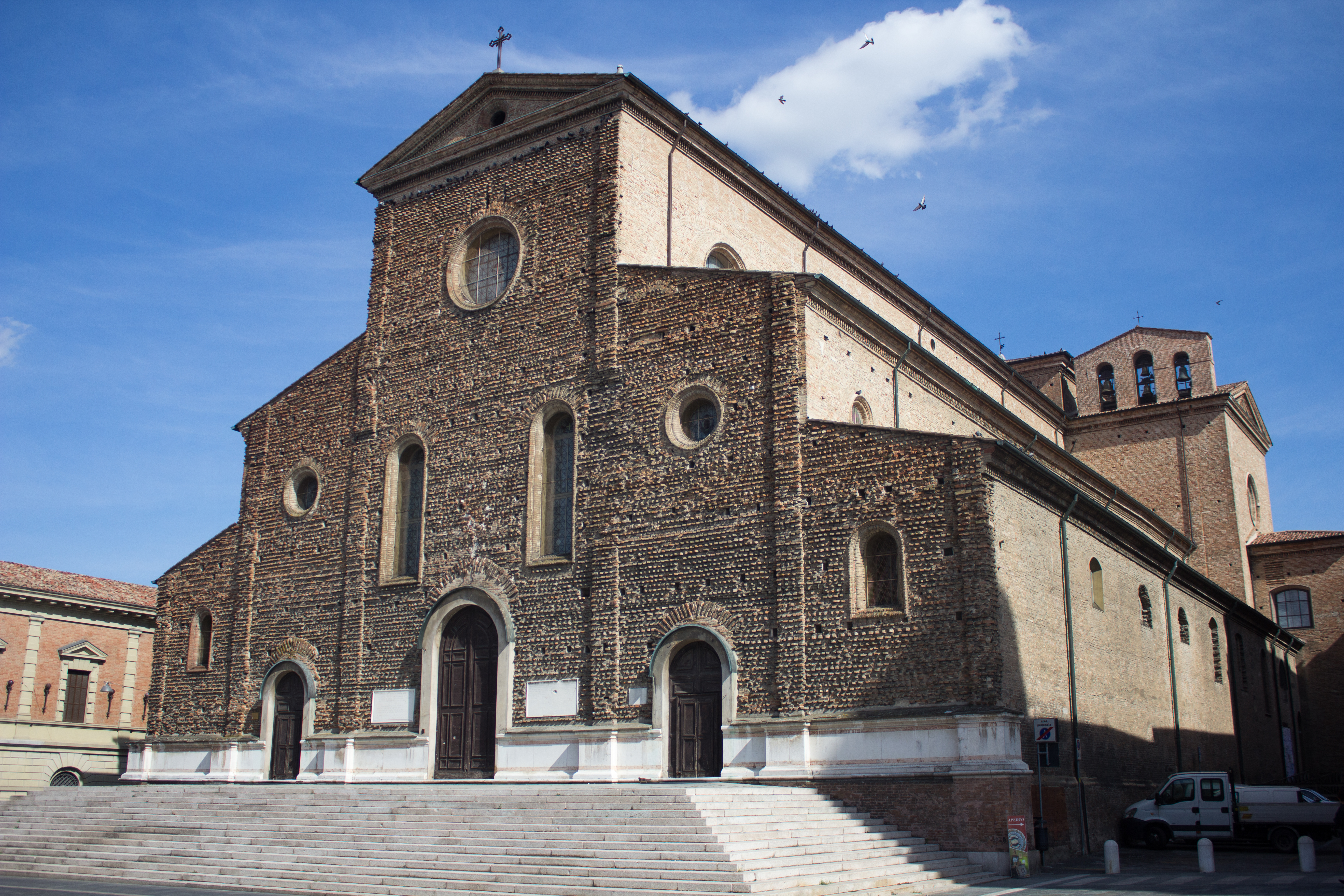 Il duomo di Faenza. This is a photo of a monument which is part of cultural heritage of Italy.